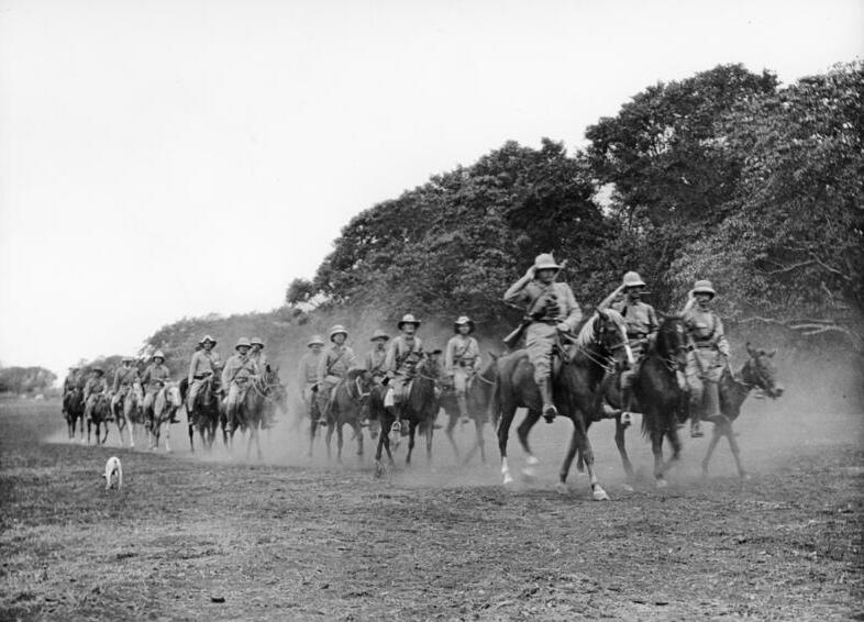 Die Pflanzer vom Kilimandscharo sind zur Stelle